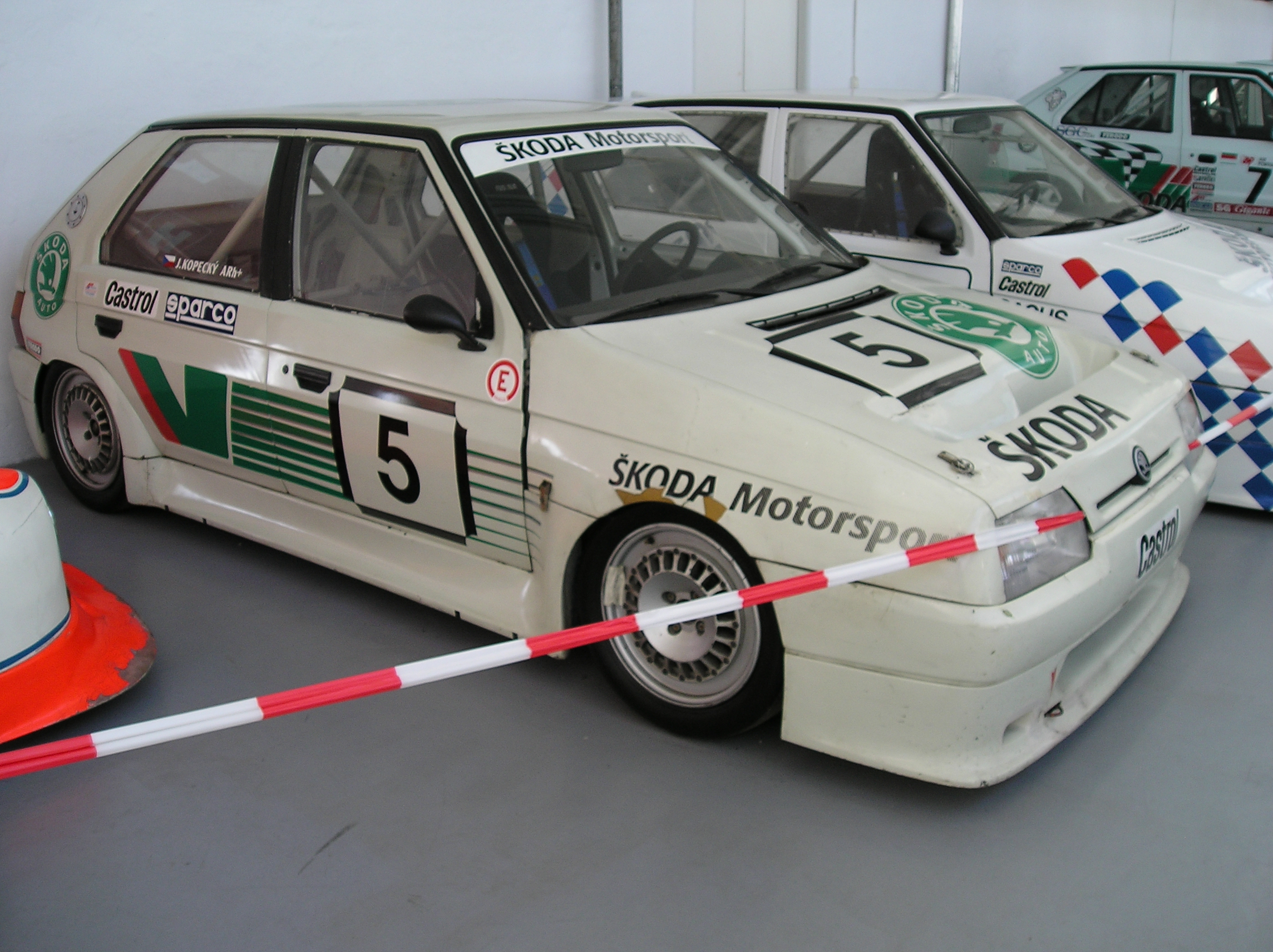 Škoda Favorit v depozitáři muzea Škoda auto